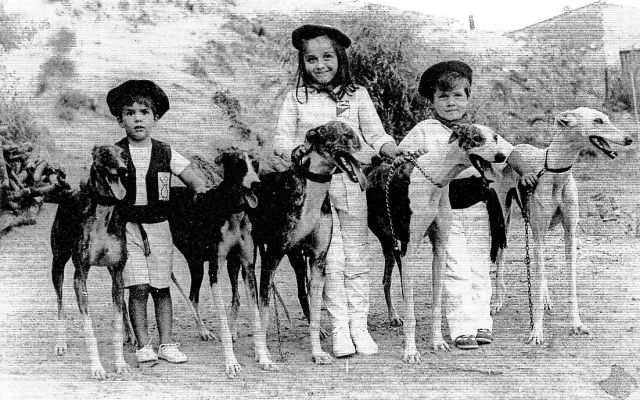 Galgo Español fotografía blanco y negro niños